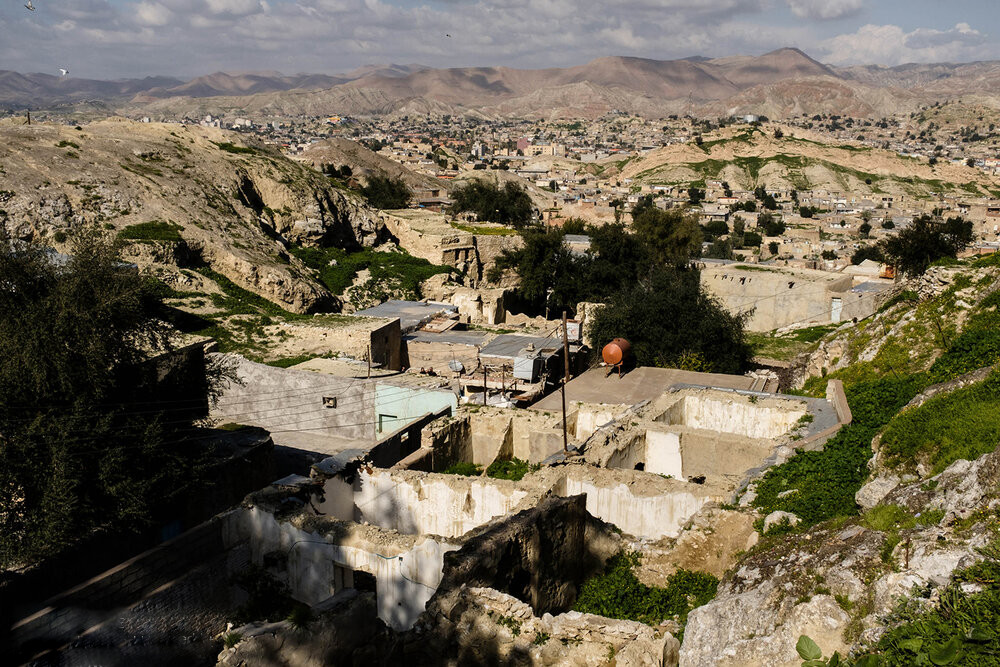 مسجد سلیمان